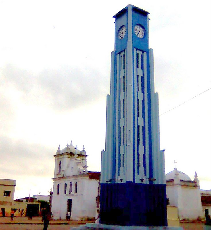 Torre do Relogio da cidade de Pombal, atrás Antiga Igreja